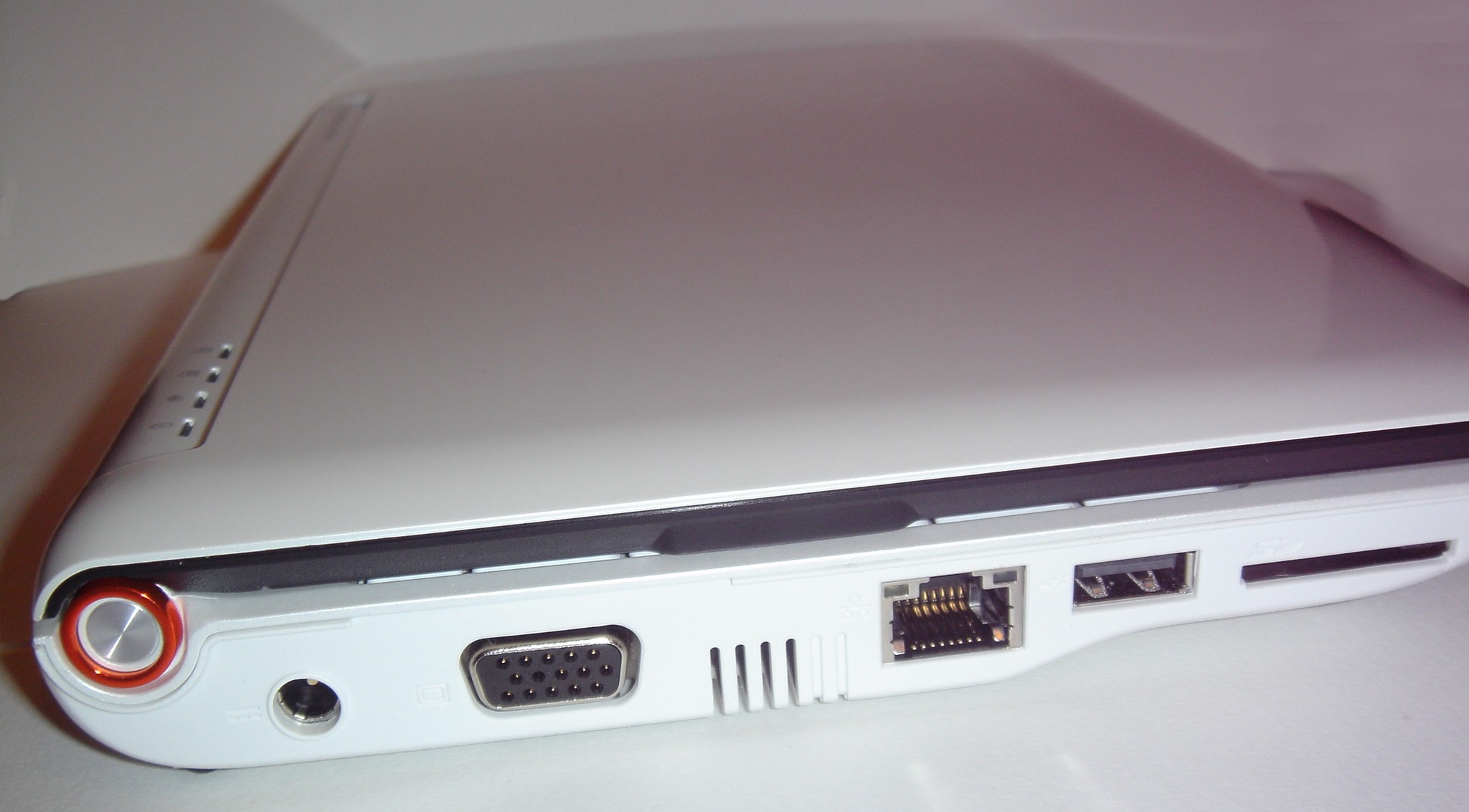 Ports disponibles sur l'acer aspire one (côté gauche).